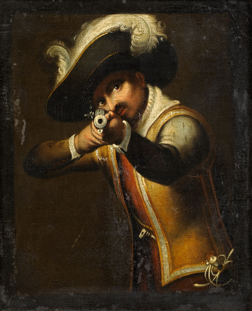 Musketier mit Muskete im Anschlag. Öl/Lwd./Holz, 19 x 16 cm